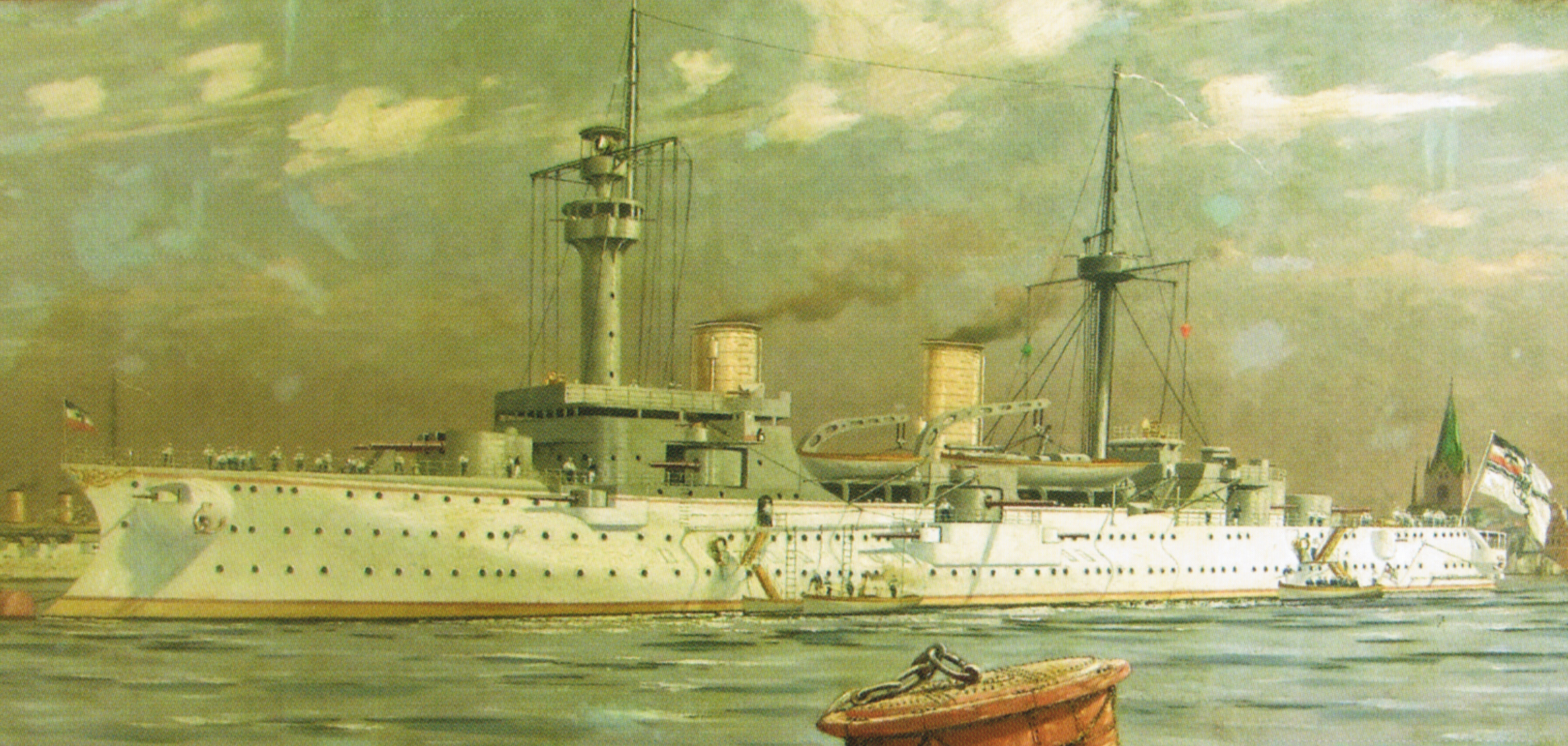 Der Große Kreuzer Fürst Bismarck, Gemälde von Fritz Stoltenberg um 1900